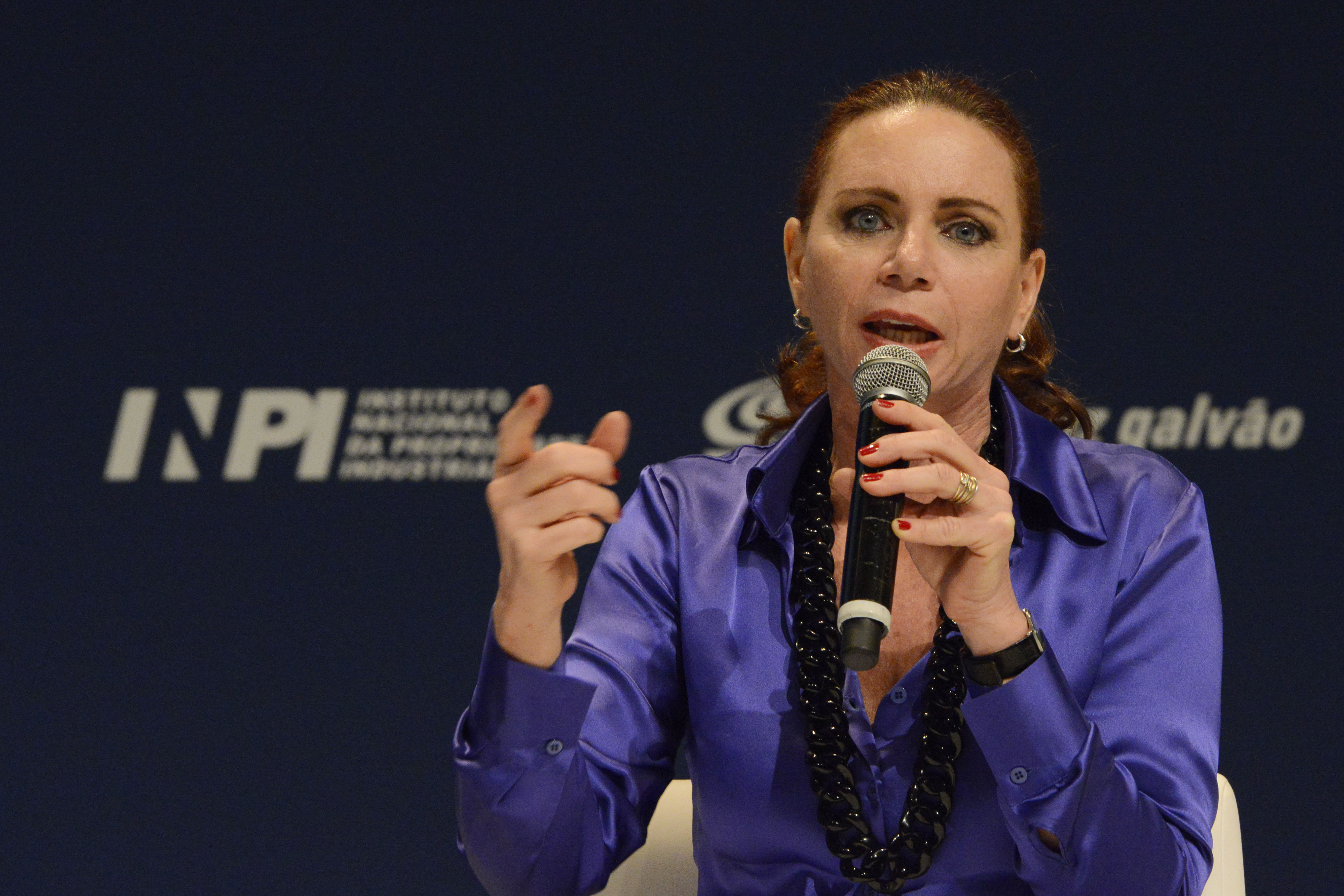 A jornalista brasileira Leilane Neubarth no 8º Encontro Nacional da Indústria, 2013